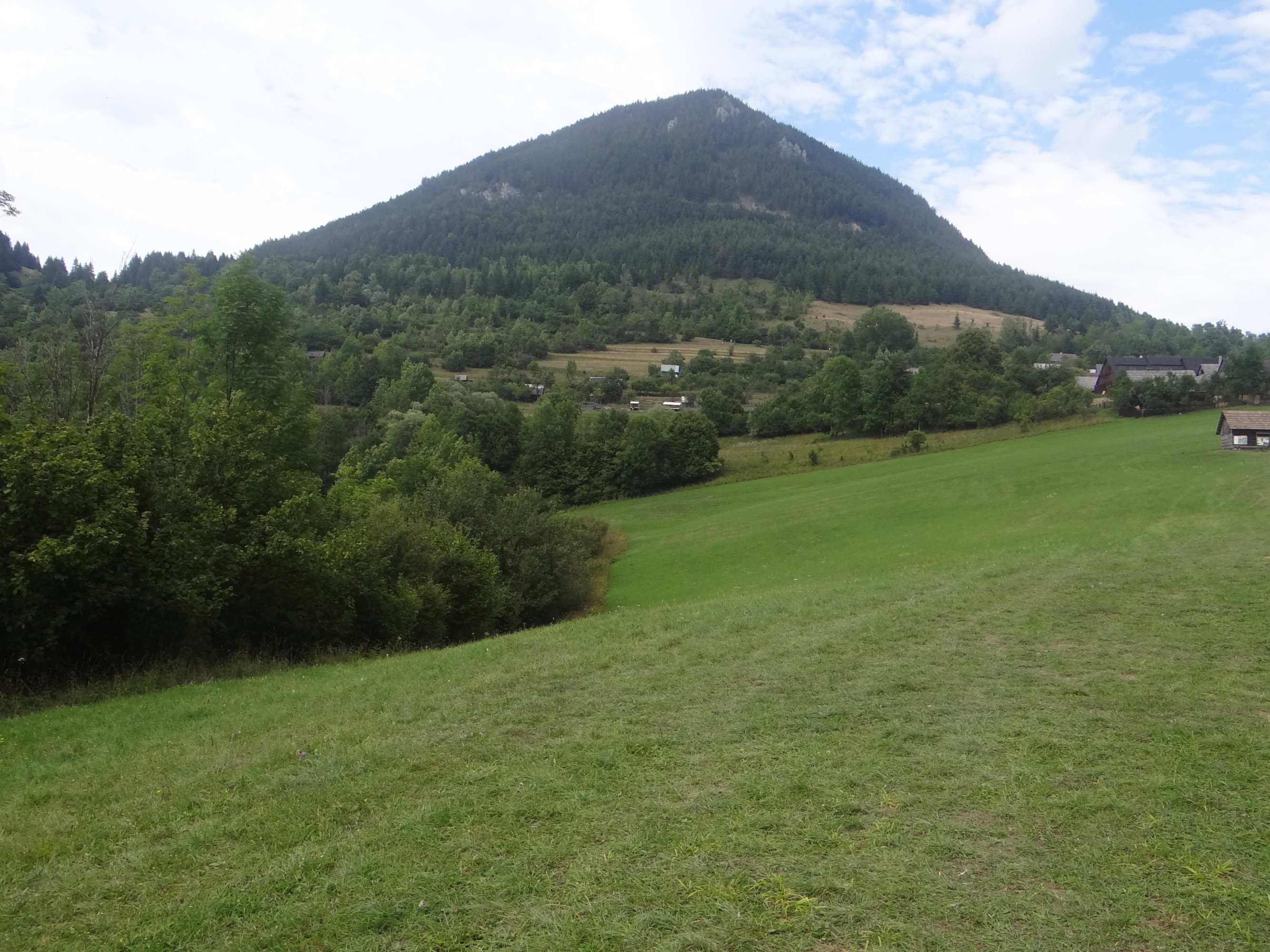 Sidorovo. View from Trlenská dolina